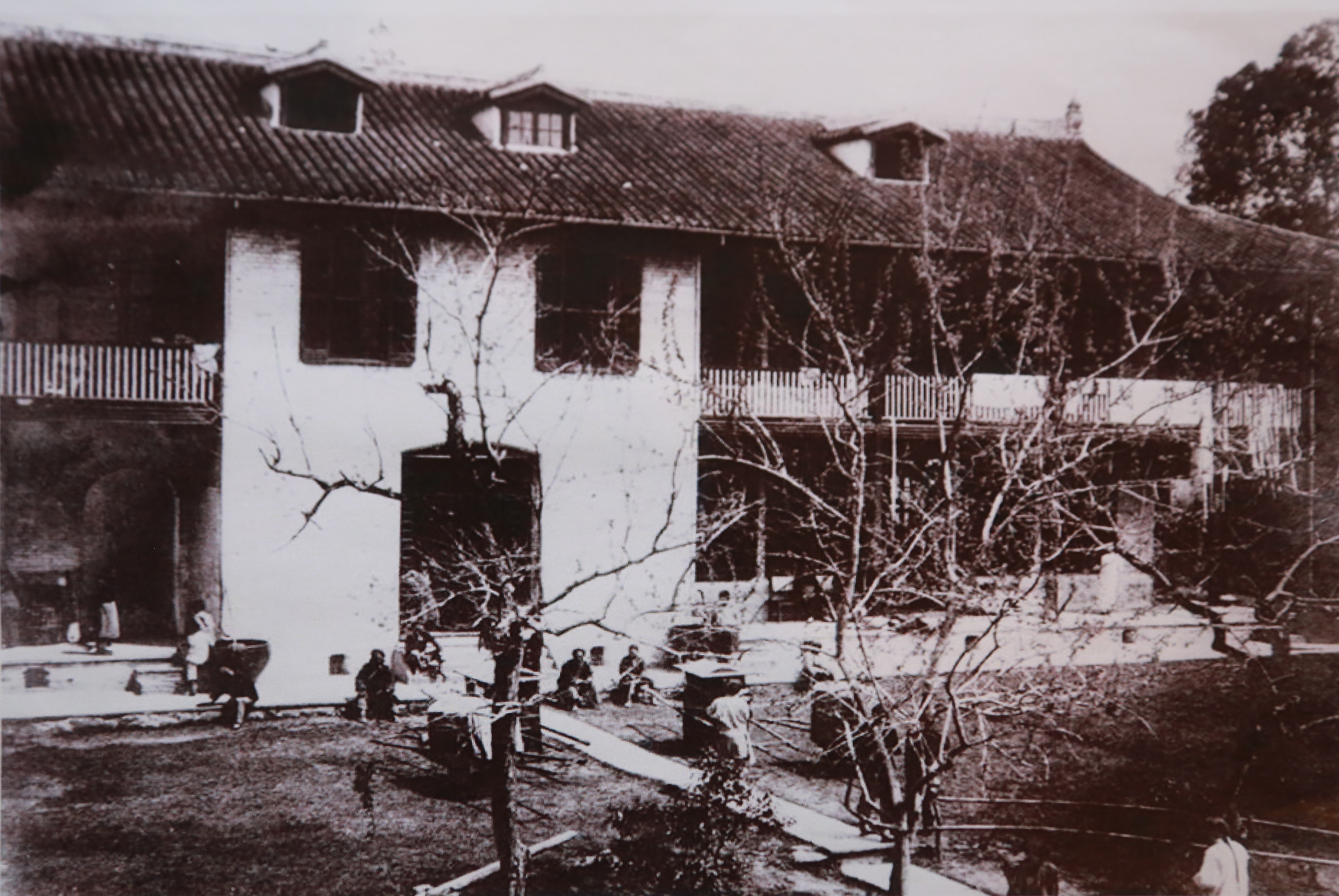 1905年，恩泽医局就诊场景，英国医生白明登拍摄